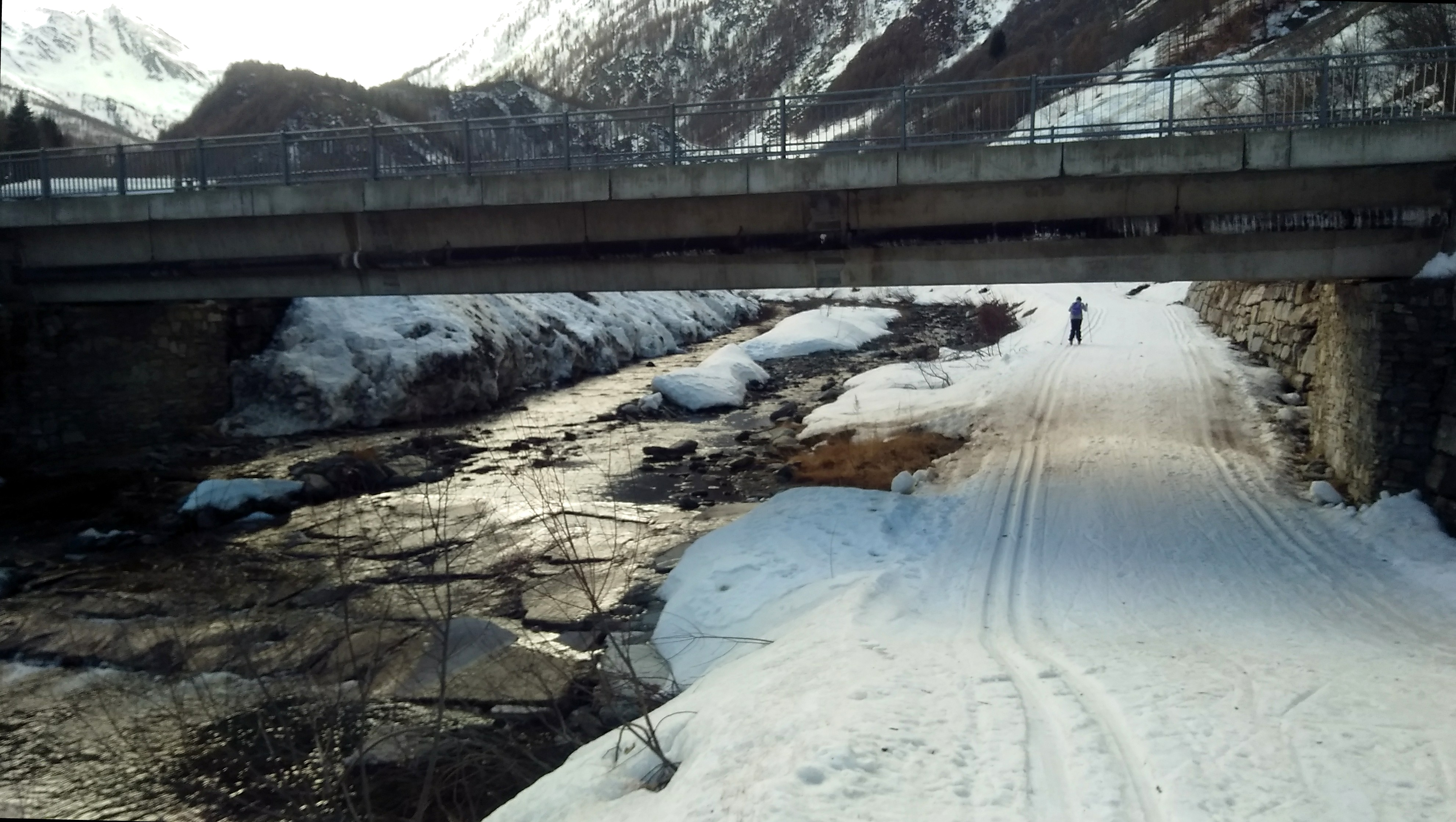 Il Germanasca d'inverno presso Prali (To)